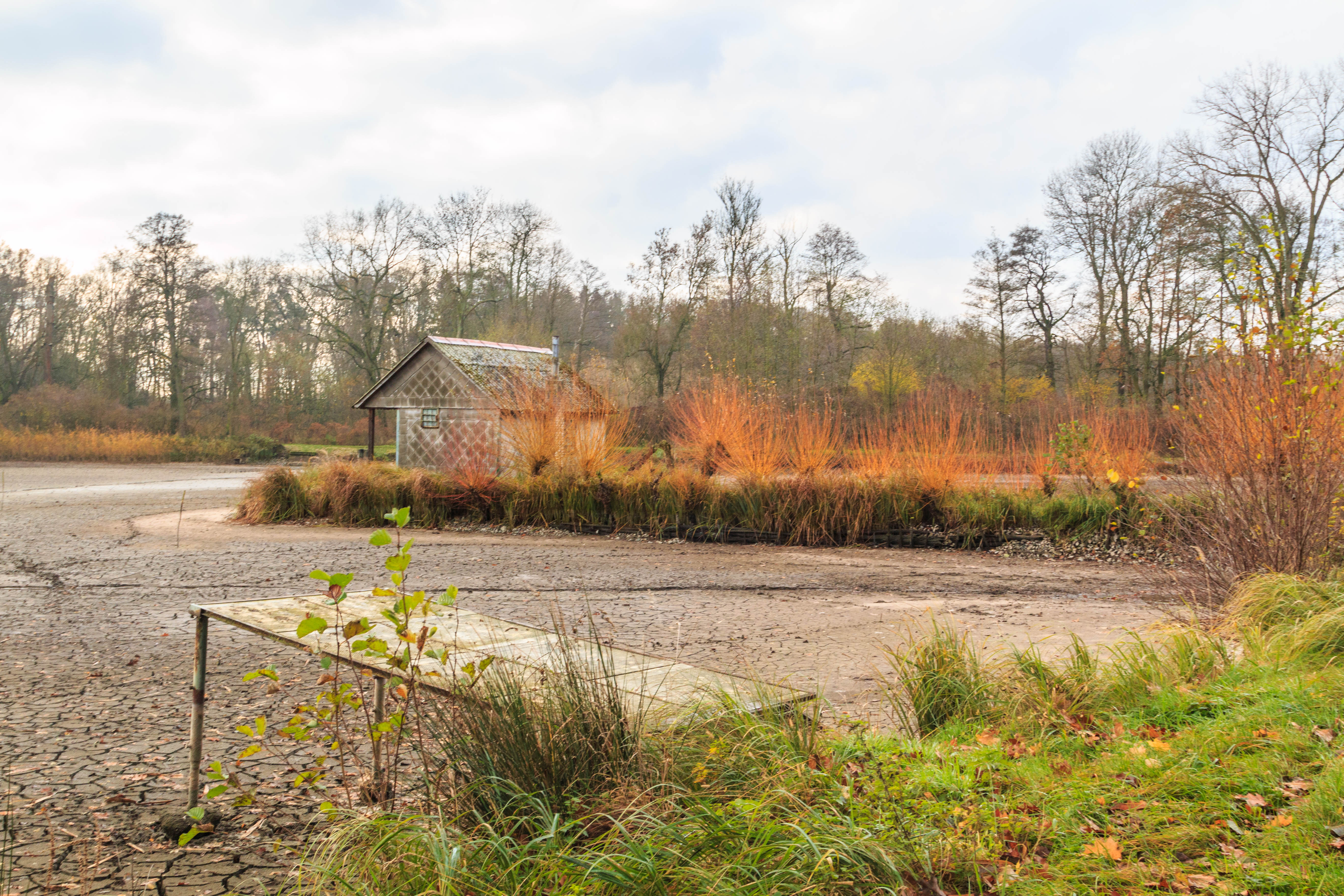 rybníky Ostřice Project: Vodstvo.